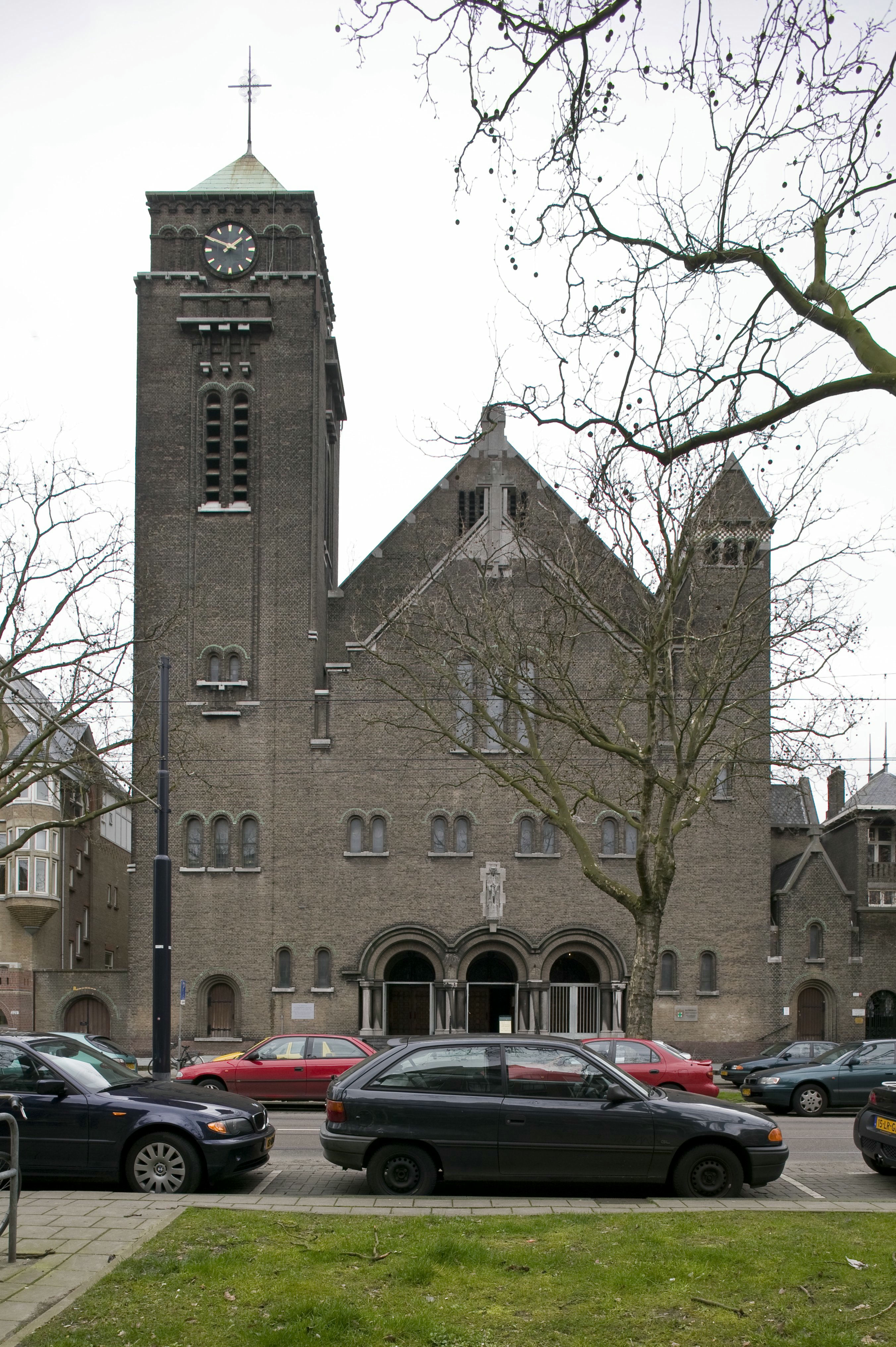 Elisabethkerk: Overizcht van de westgevel (opmerking: Kanjers 2001)